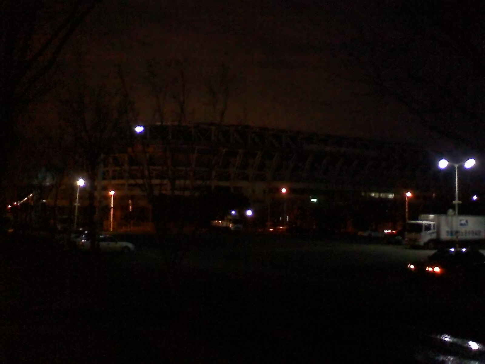 제가 직접 촬영한 사진입니다.